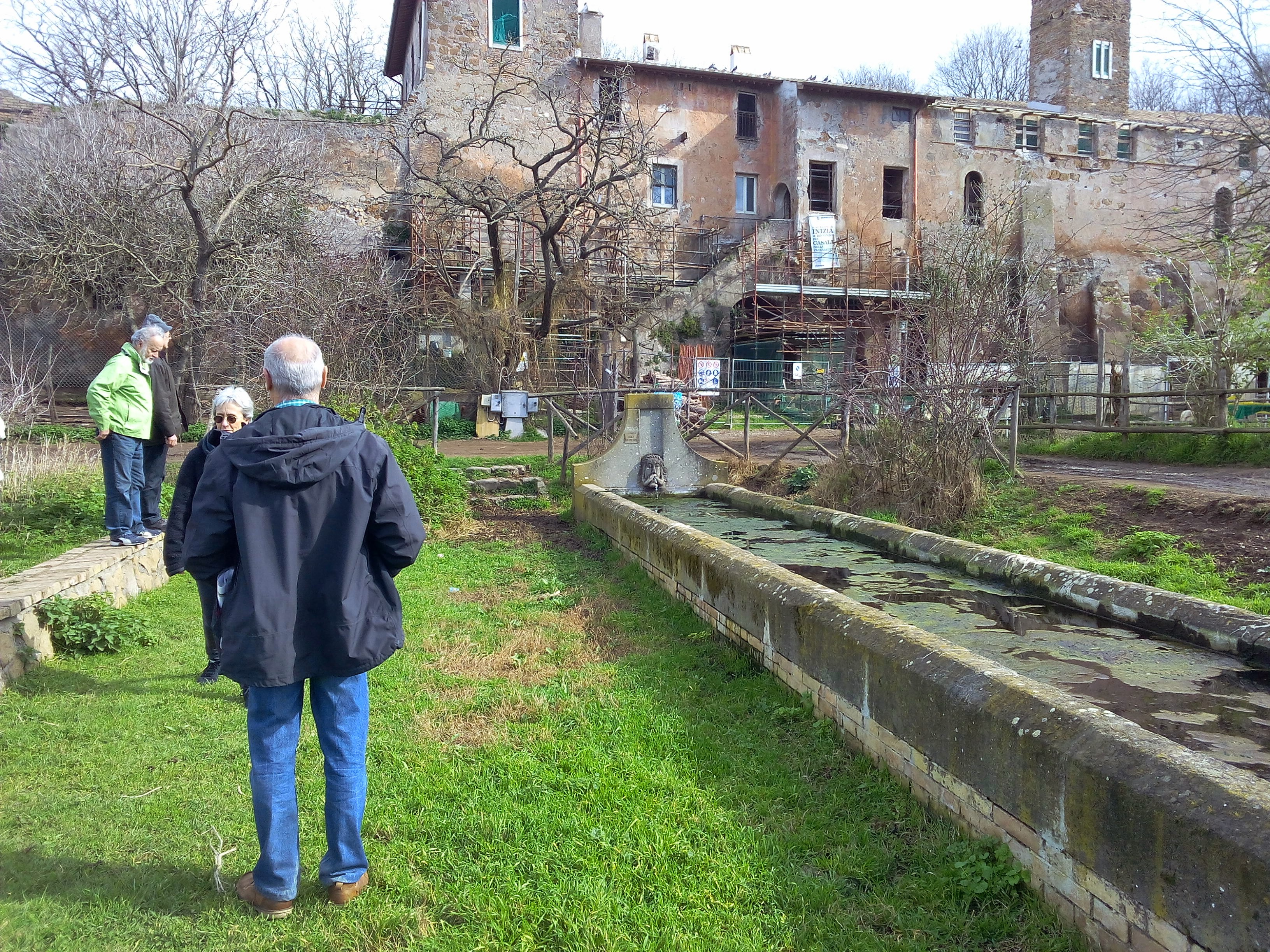 giovedì 26 febbraio 2015 Le Visure Acatastali nella Valle della Caffarella. Casale della Vaccareccia